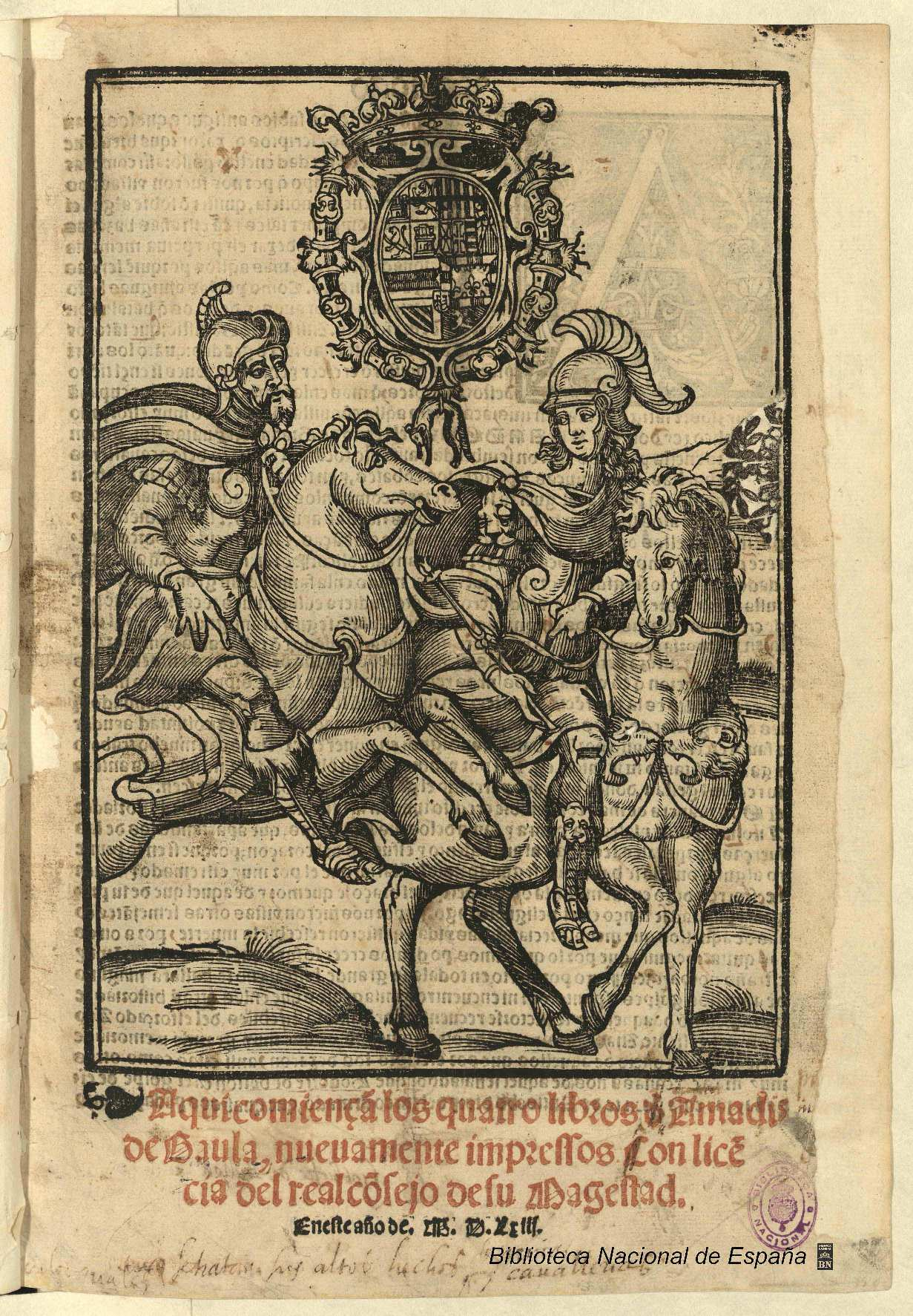 Aqui comiençã los quatro libros d' Amadis de Gaula, nueuamente impressos ... Autor: Santillana, Pedro de (fl. 1553-1588) Fecha: 1563 Datos de edición: Impresso enla ... ciudad de Burgos por Pedro de Santillana ...